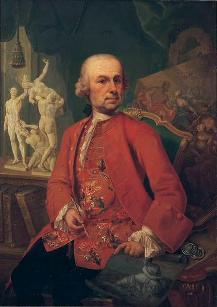 Franz Georg Hermann d. J., Selbstbildnis